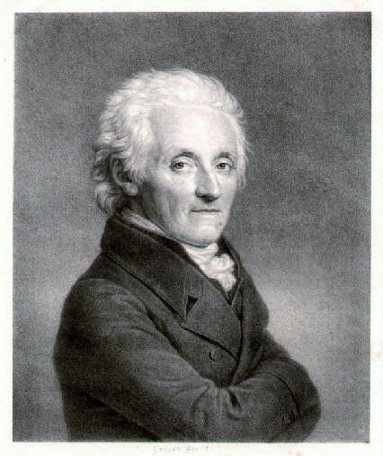 Porträt des Hamburger Kaufmanns Otto von Axen